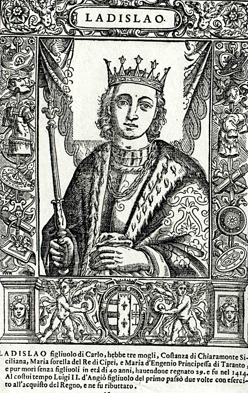 László nápolyi király (rézkarc alapján)